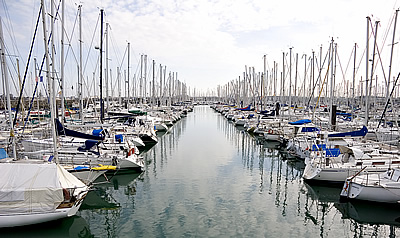 Le Port des Minimes - La Rochelle Photo issue de ma banque d'images personnelle : Pep.per 21 mars 2006 à 00:39 (CET)